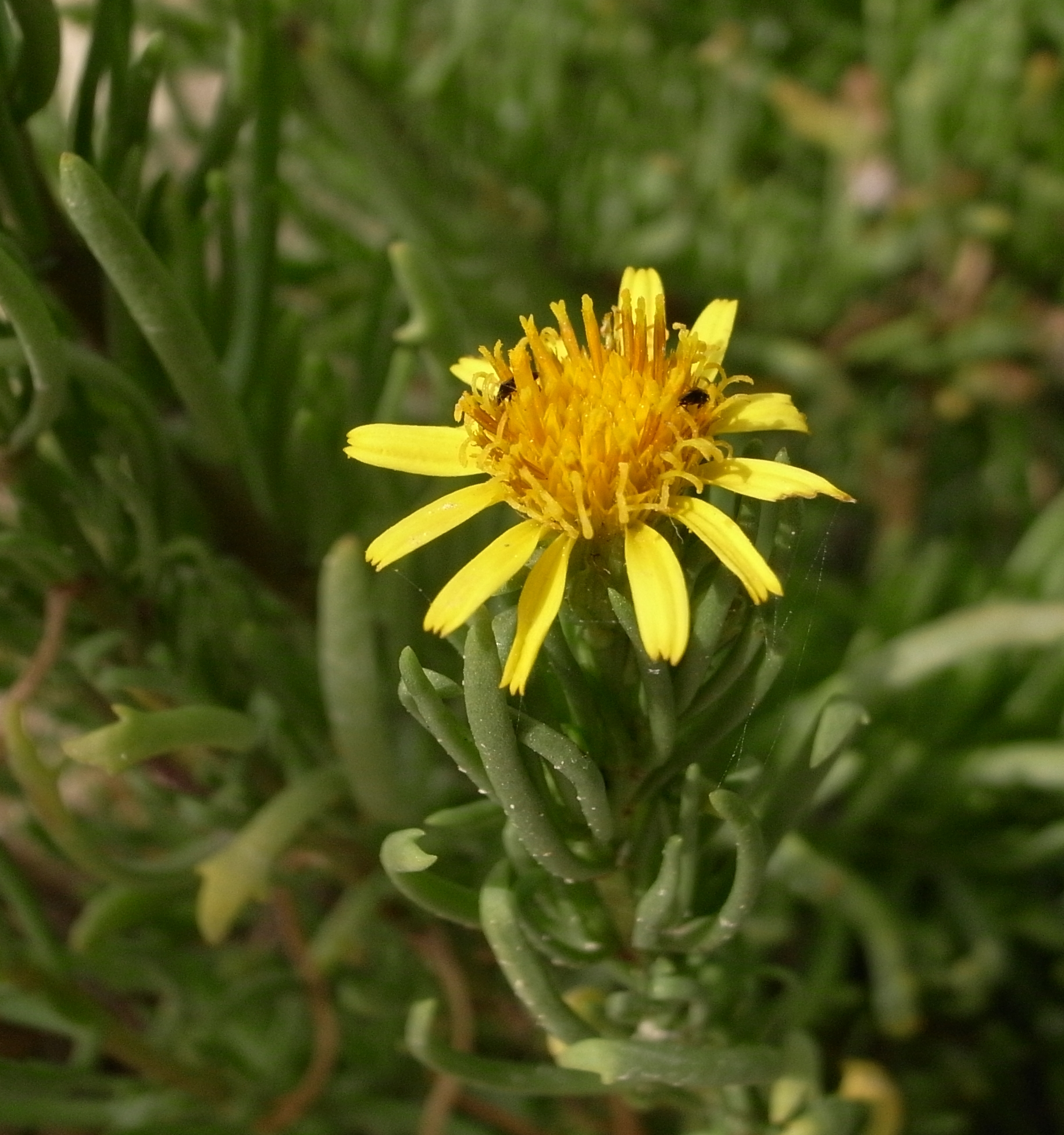 Inula crithmoides, Sliema, Triq it-Torri, Malta Flora